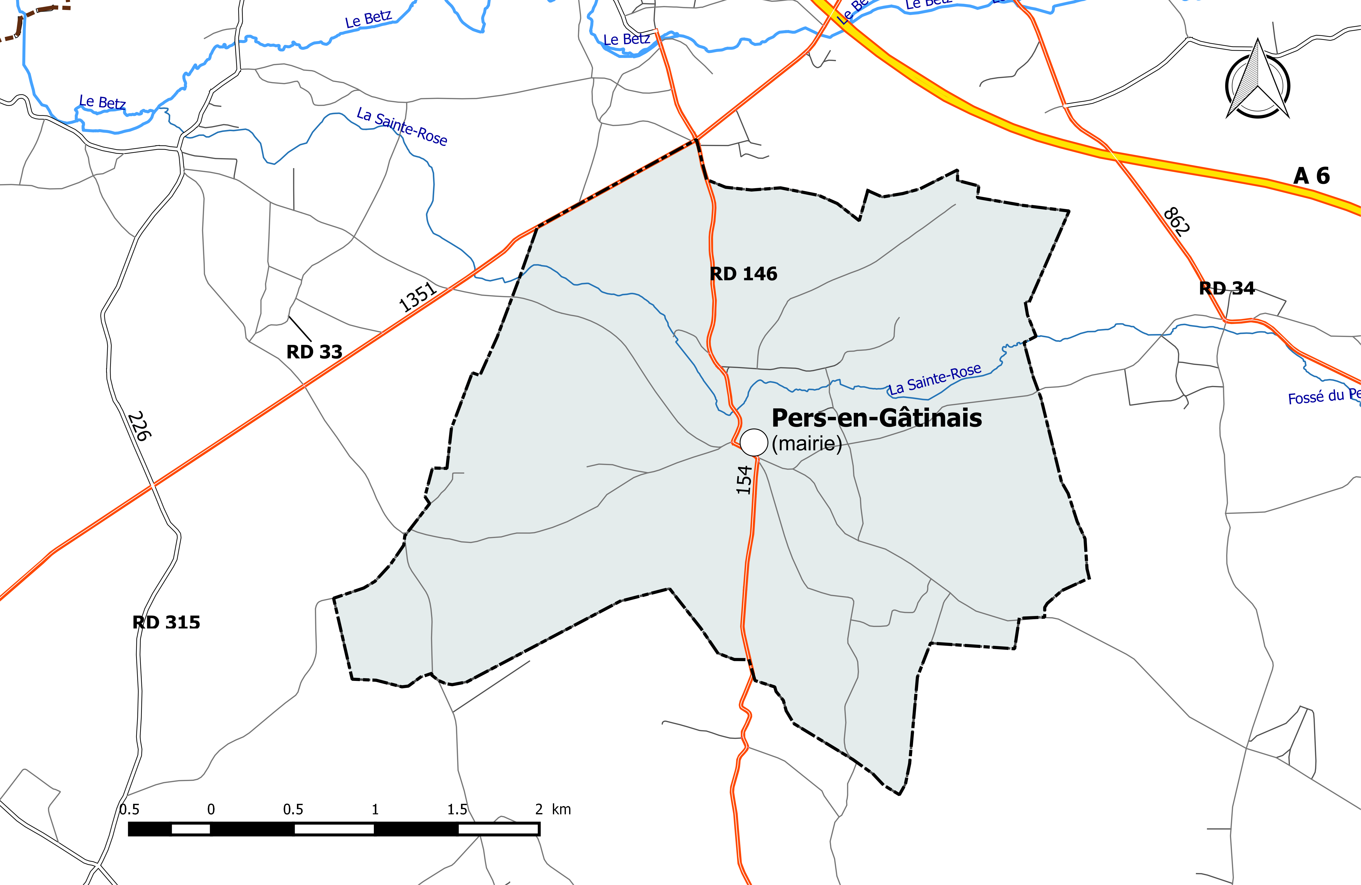 Carte du réseau routier de la commune de Pers-en-Gâtinais.